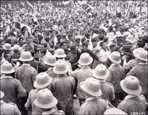 미소공동위원회가 열리던 덕수궁 앞에서 반탁시위를 벌이던 군중들 (1946년 5월)